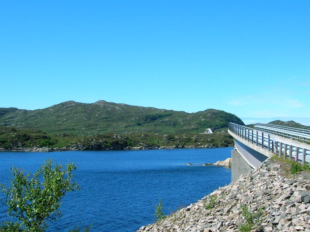 Byrknesøy in Gulen, Norway. Picture taken 2006-07-18 by Gunnar Buvik